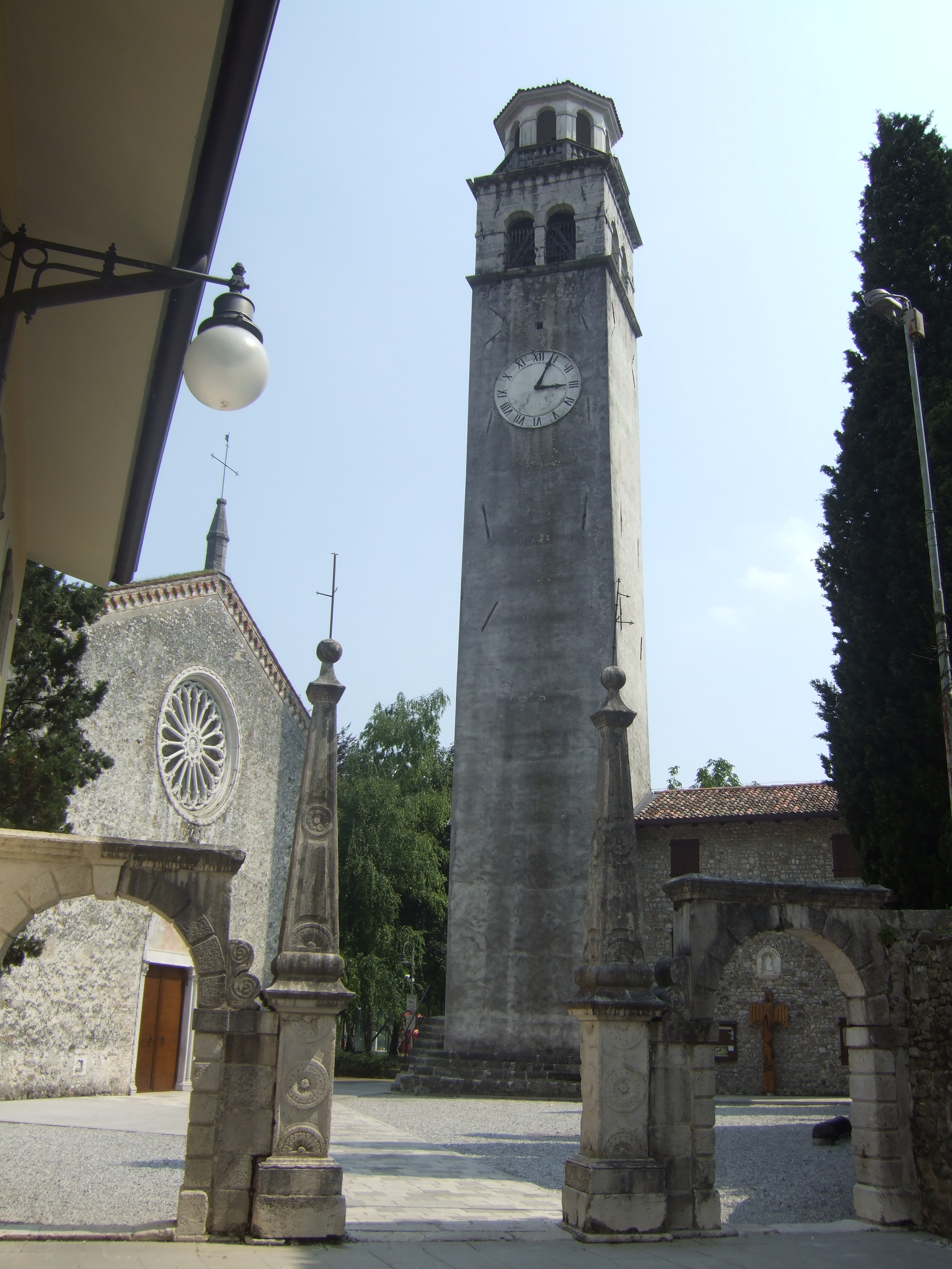 Duomo di Maniago - Facciata e Campanile